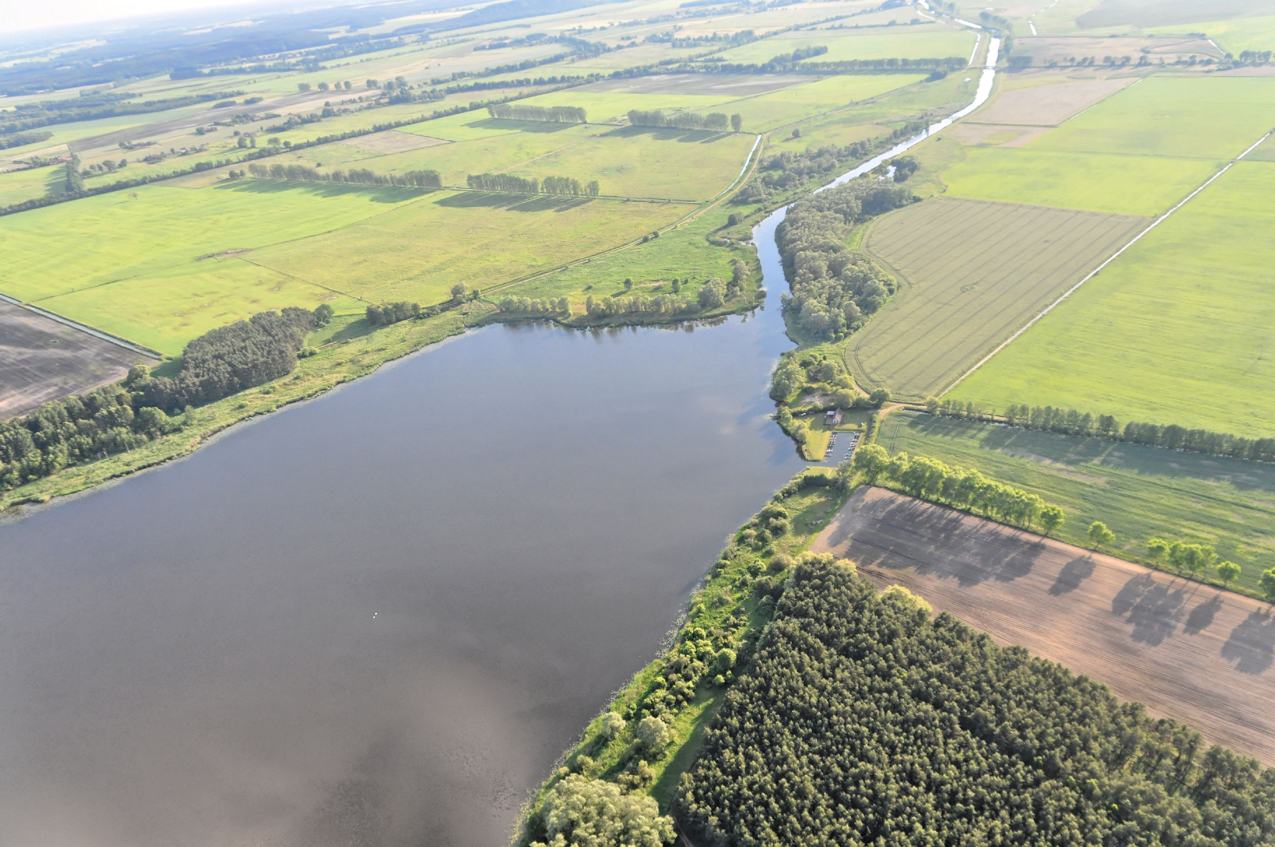 Überführungsflug vom Flugplatz Nordholz-Spieka über Lüneburg, Potsdam zum Flugplatz Schwarzheide-SchipkauDer Rhin bzw. Rhinkanal verlässt den Dreetzer See.